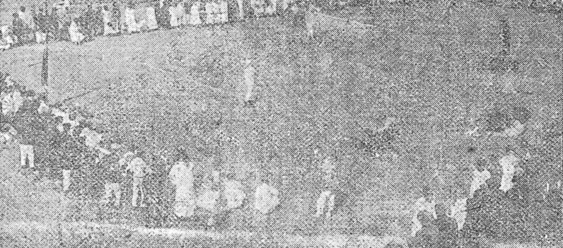 1923년 전국체육대회 정구(제3회 전조선정구대회) 대회 1일차 경기 모습.